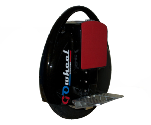 Моноколесо- электрическое транспортное средство позволяющее передвигаться по различной поверхности со скоростью до 18 км/ч